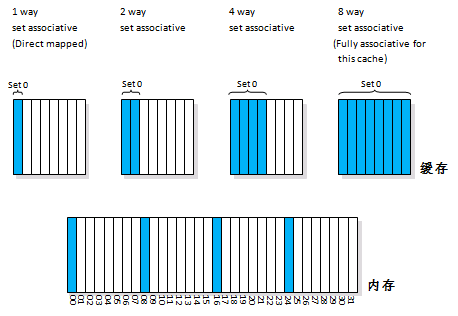 组关联CPU缓存